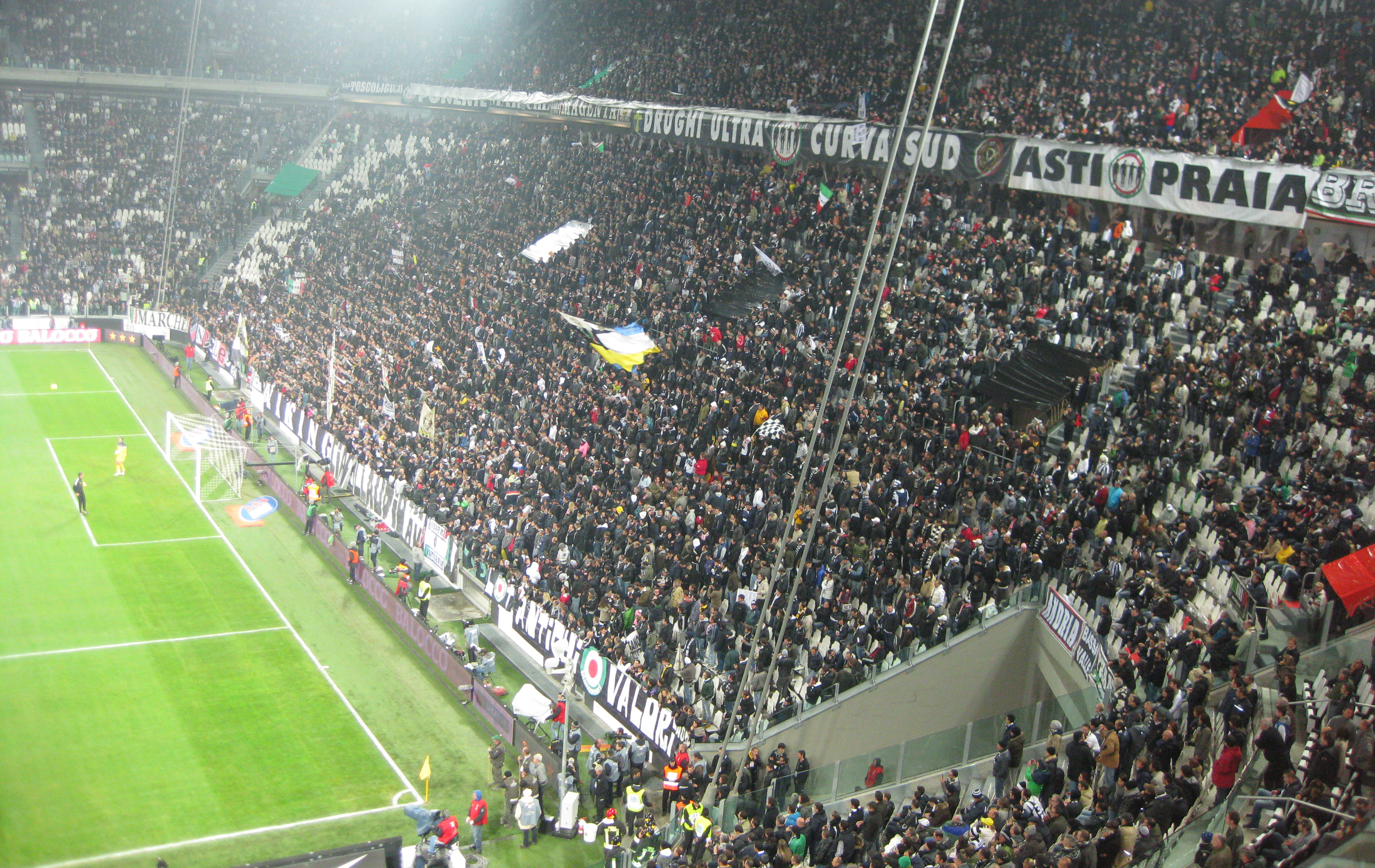 La tribuna dello Juventus Stadium dove risiedono gli ultrà della Juventus